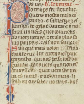 Détail du manuscrit BNF ms.856 f.258r concernant le troubadour Bernart de Venzac